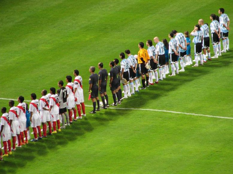 Jugadores previo al partido Argentina vs. Perú, Copa América 2007, Venezuela.Copa América_3